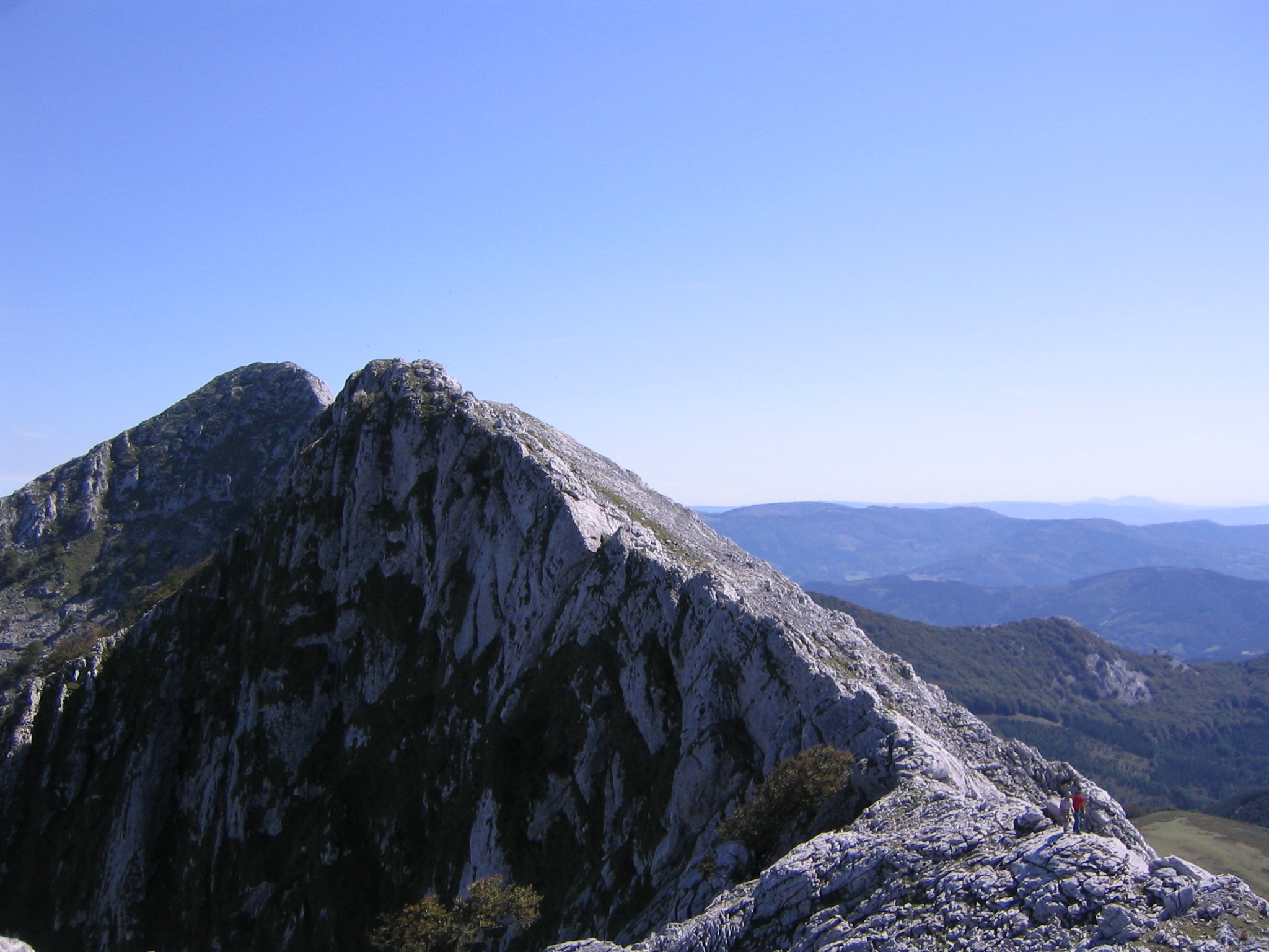 Montaña Elgoin País Vasco, España.